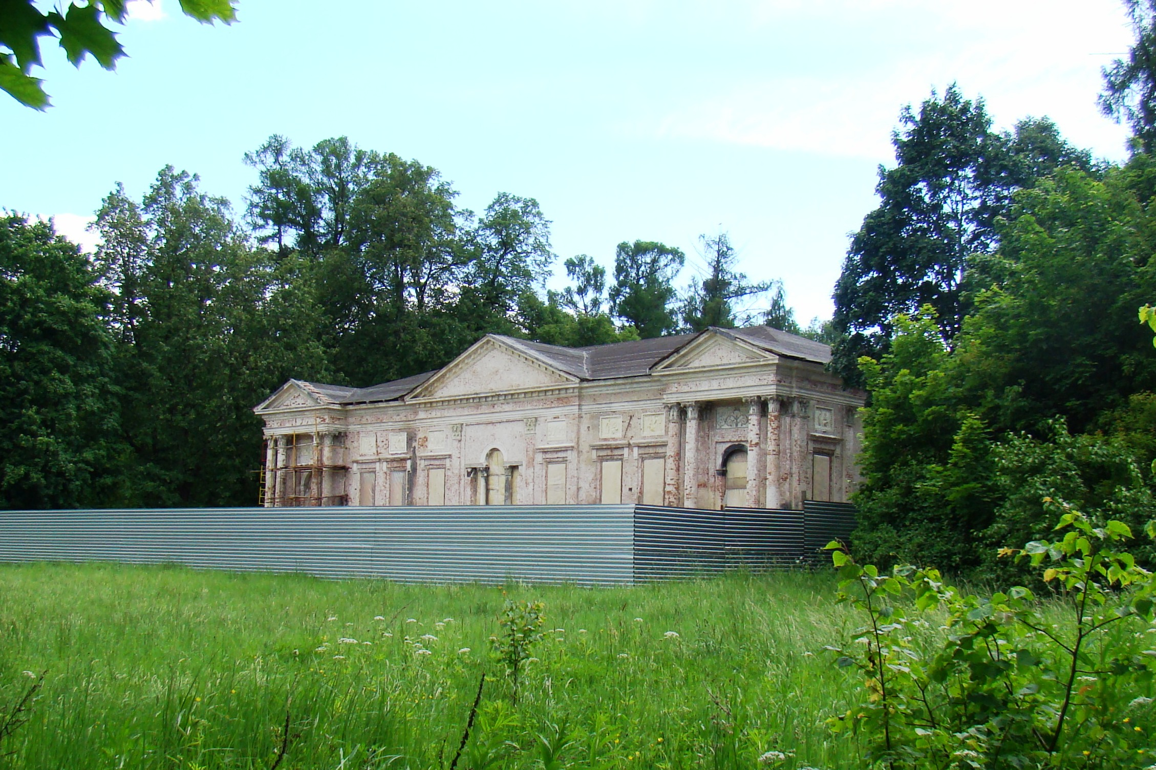 Domaine familial des comtes Golitsine à Nikolo-Ourupino